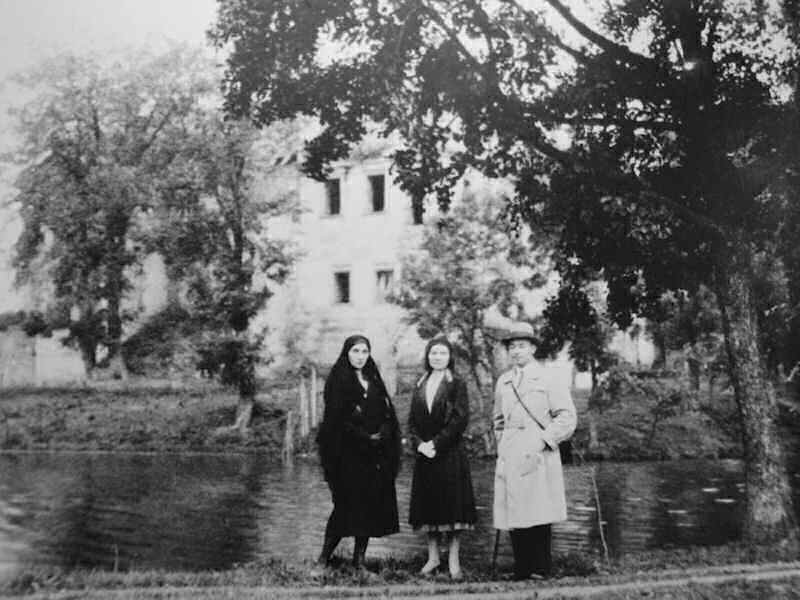 Rodzina Eisenbergów z Szydłowca ok. 1900